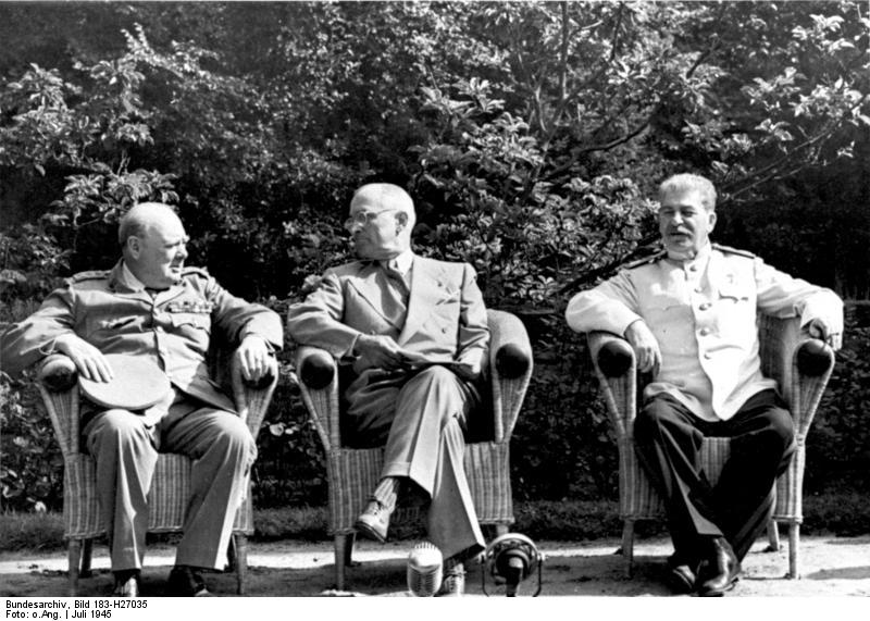 Zentralbild / SNB Potsdamer (Berliner) Konferenz der führenden Staatsmänner der drei alliierten Mächte der UdSSR, Großbritannien und der USA vom 17. Juli bis 2. August 1945 in Schloß Cecilienhof und Babelsberg. Ihr Ergebnis ist das Potsdamer Abkommen, das die völkerrechtlichen Grundfragen für den Aufbau eines friedlichen, demokratischen deutschen Staates und die Politik der Siegermächte gegenüber Deutschland festgelegt. UBz.: V.l.n.r.: Winston Churchill, Harry S. Truman, J.W. Stalin 5050-50